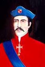 Português do Brasil: Retrato de Luís Barbalho Bezerra (1584-1644).